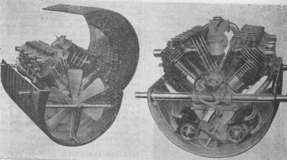 Fiat A.8motore aeronautico